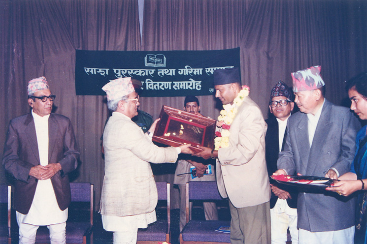 नेपाली: २०५१ सालको साझा पुरस्कार ग्रहण गर्दै